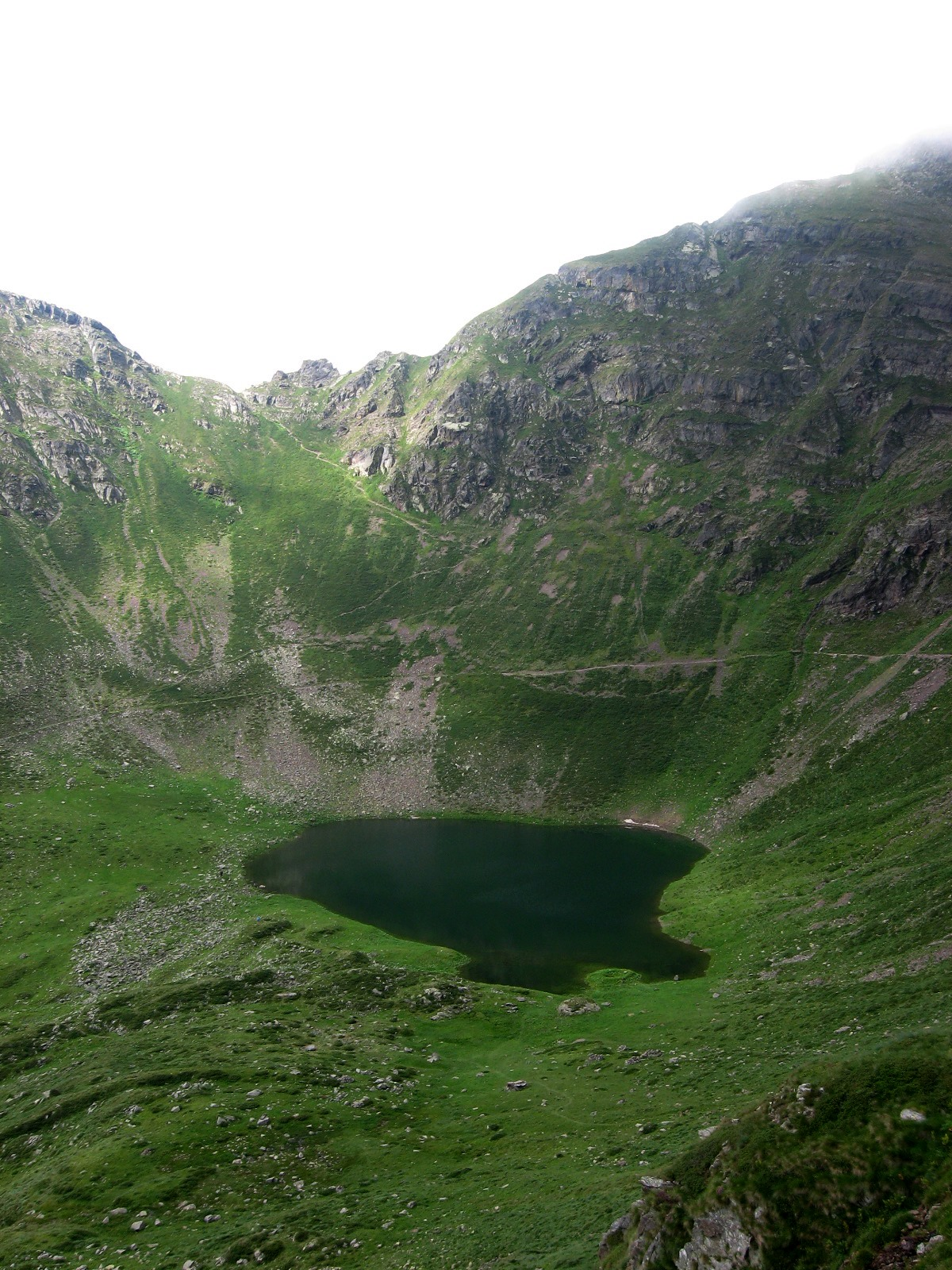 Lago di Valbona e sella verso la val Asinina. Val di Scalve (BG)